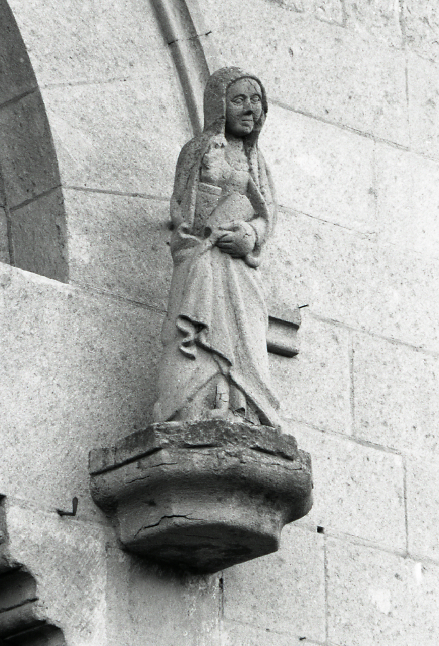 Servizio fotografico : Viterbo, 1970 / Paolo Monti. - Strisce: 4, Fotogrammi complessivi: 5 : Negativo b/n, gelatina bromuro d'argento/ pellicola ; 35 mm. - ((Sul portanegativi: NIKON FP4. - La serie è identificata da Monti con segni grafici e iscrizioni didascaliche ("Chiesa di S.") in corrispondenza dei numeri dei relativi fotogrammi stampati sulla faccia interna del portanegativi, e distinta dalla precedente e dalla successiva. - Occasione: Documentazione dell'Etruria meridionale. - Fonte: Agenda di Paolo Monti: Monti - Agenda 1970 (1970), presso Archivio Paolo Monti. - Fonte: Fattura di Paolo Monti: IV. Commesse/ Fattura/ Lavoro fotografico territorio di Viterbo (1971/03/27), presso Archivio Paolo Monti. Non datata, unico riferimento "27/3" (manoscritto a matita rossa). Viterbo. Riprese fotografiche del Duomo, San Francesco [...] "Emettere il mandato di pagamento a nome di Giorgio Boschetti". - Fonte: Monografia di Raspi Serra, Joselita: La Tuscia romana un territorio come esperienza d'arte: evoluzione urbanistico-architettonico, Milano, Electa (1972)